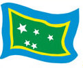 Bandeira Oficial de Araci (Bahia)